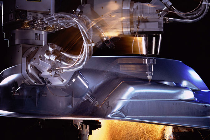 3-D Laserschneiden